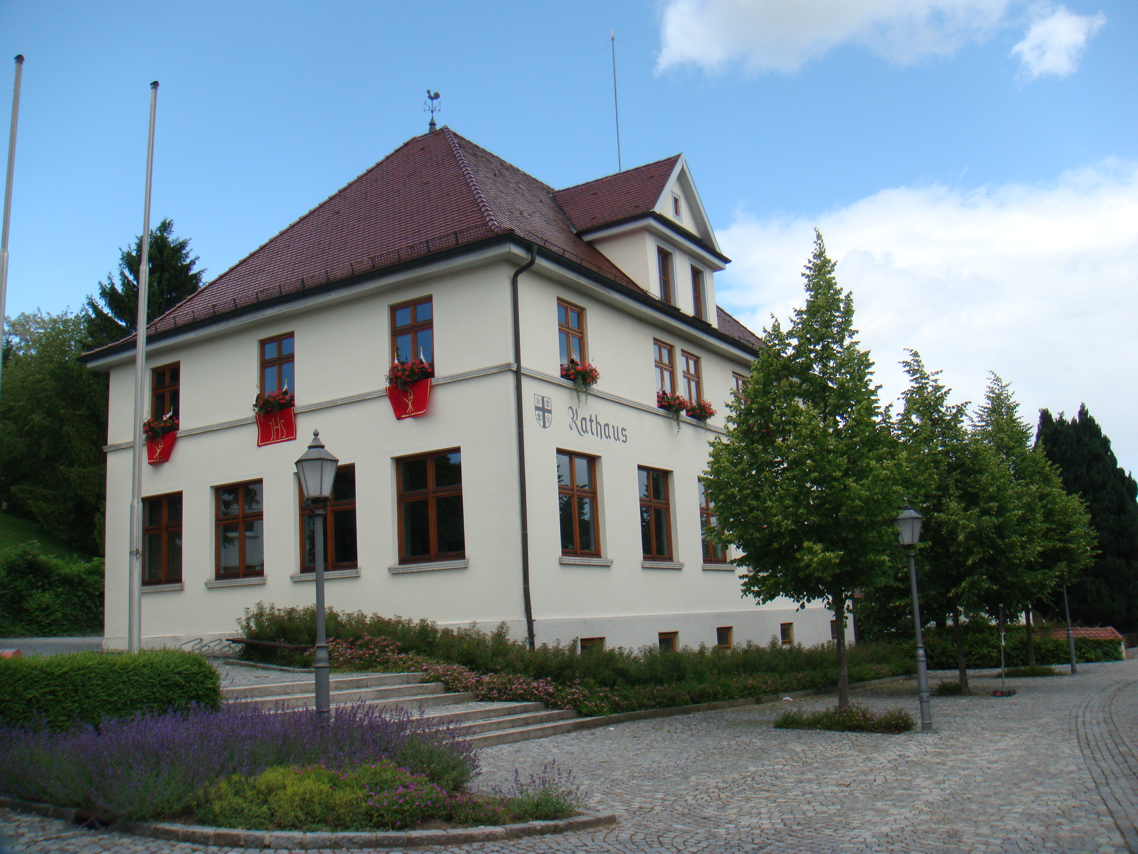 Rathaus Illerrieden in der Wochenauerstraße